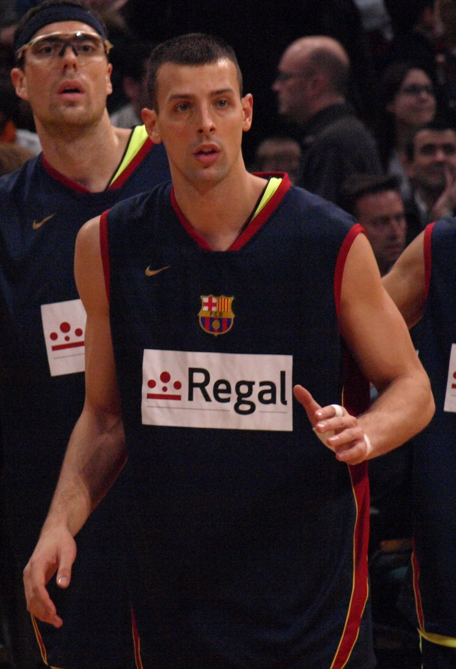 Jordi Trias, en el partido que enfrentó al FC Barcelona y al DKV Joventut de liga ACB en el Olímpico de Badalona en enero de 2009